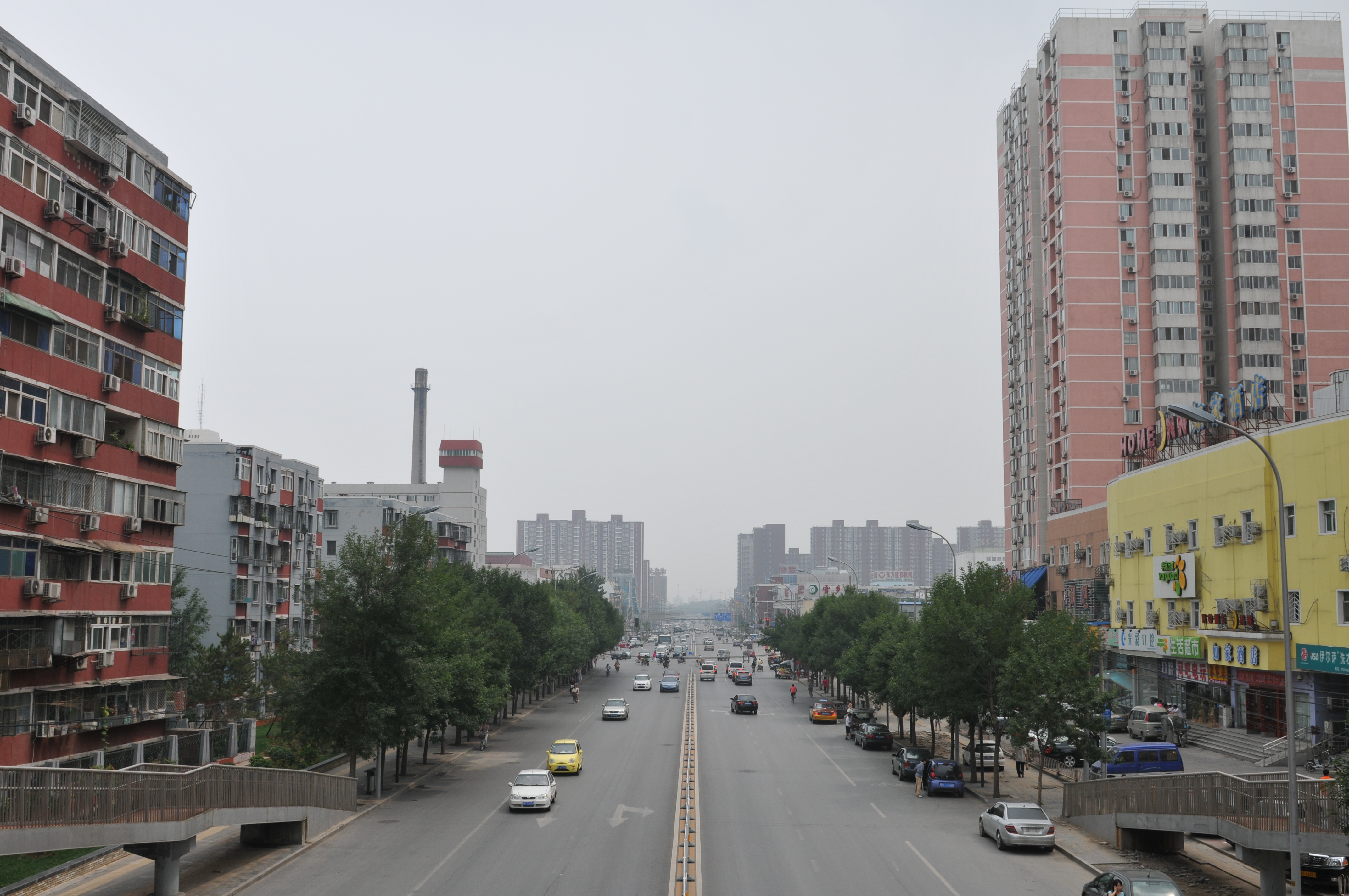 中国北京丰台区 China Beijing, Fengtai District, China Xinjiang Urumqi Welcome you to tour the, Китай Синьцзяна Урумчи приветствовать Вас на экскурсию, الصين ترحب زيارتك لاورومتشى فى شينجيانغ, 中国新疆のウルムチへの訪問を歓迎する, 中国新疆乌鲁木齐欢迎您来观光旅游